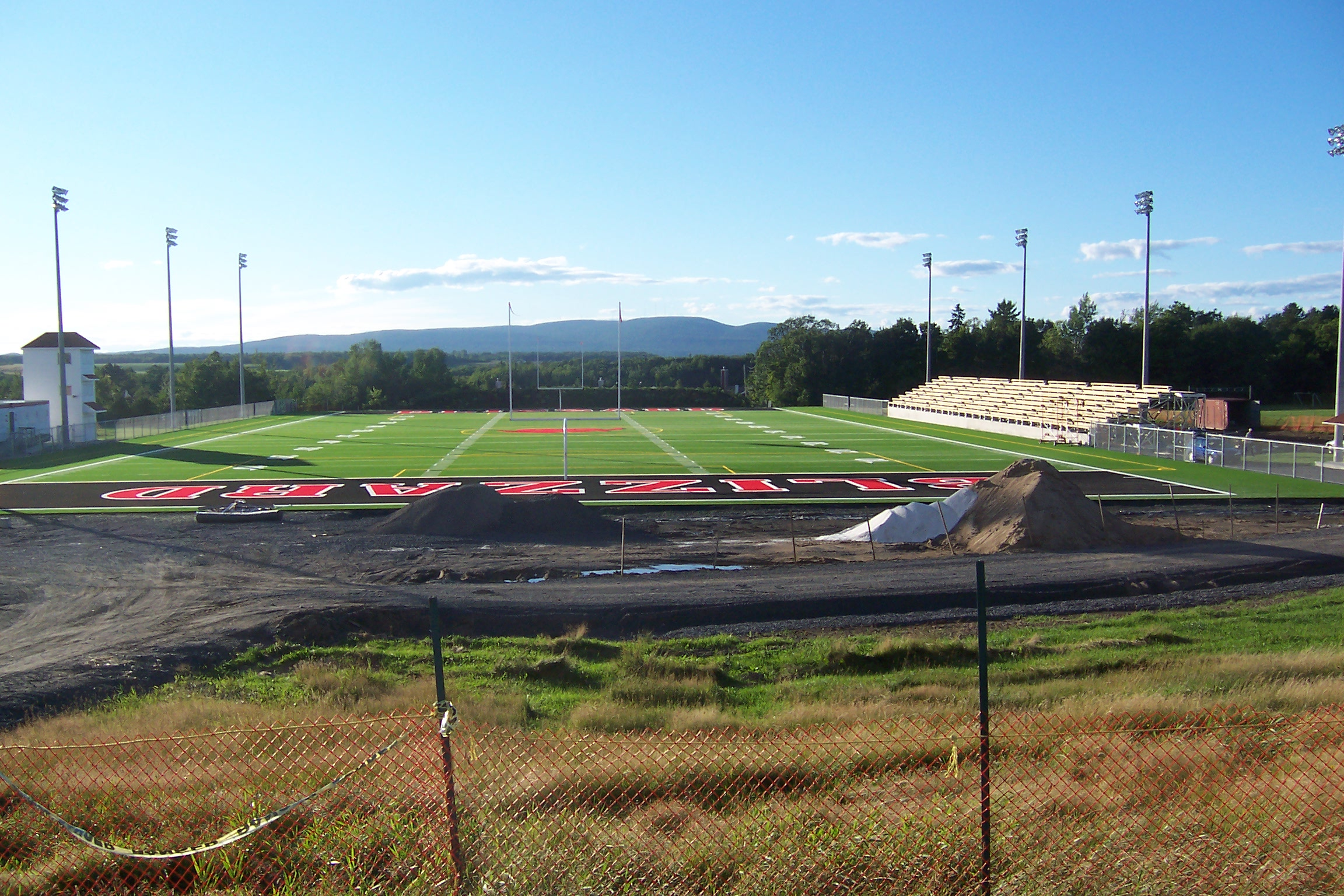 Nouveau stade de football et soccer du Séminaire Saint-François, situé à Saint-Augustin-de-Desmaures, Québec, Canada.